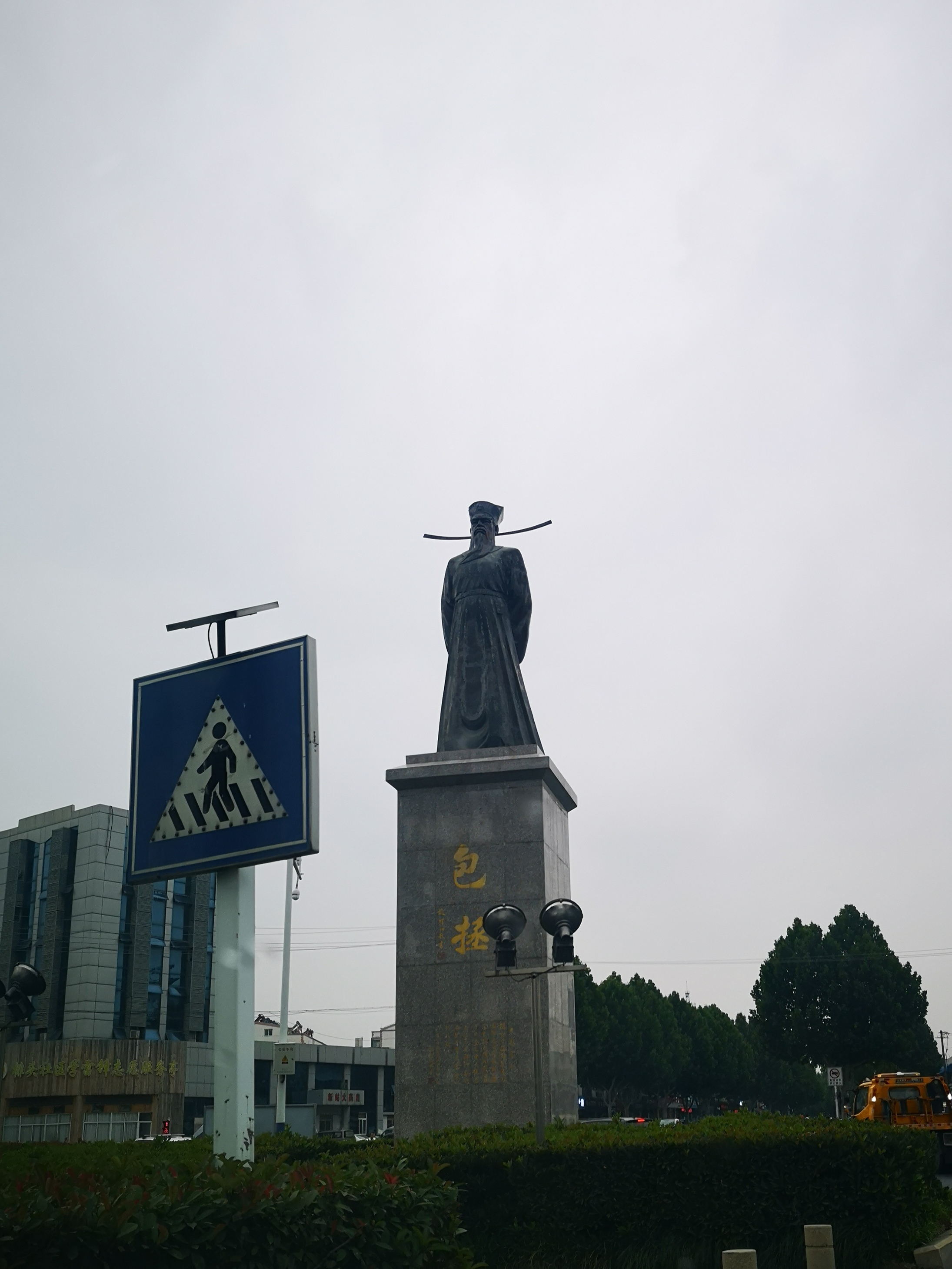 中文（中国大陆）: 肥东县包拯塑像